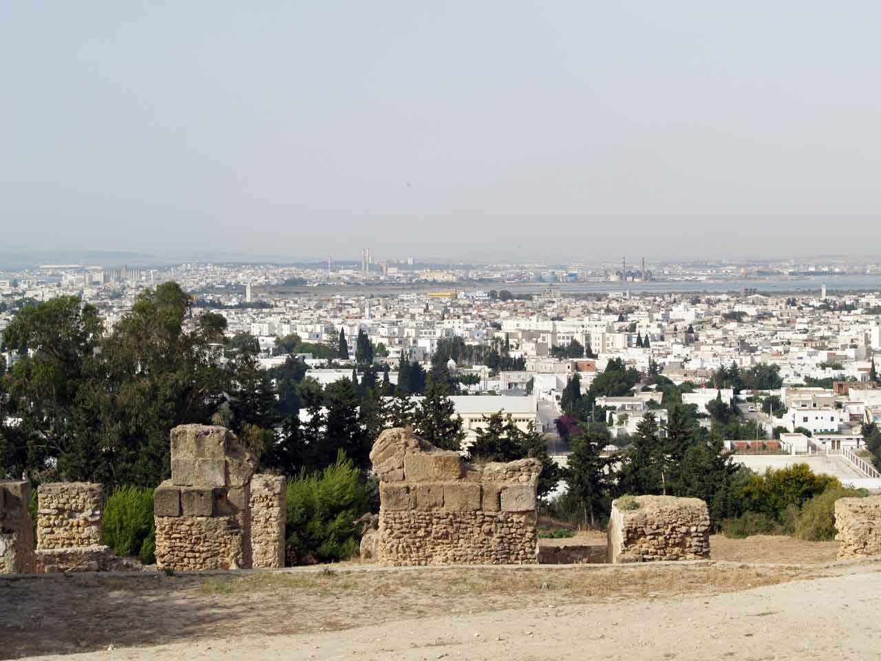 Carthage - Un siècle d'urbanisation